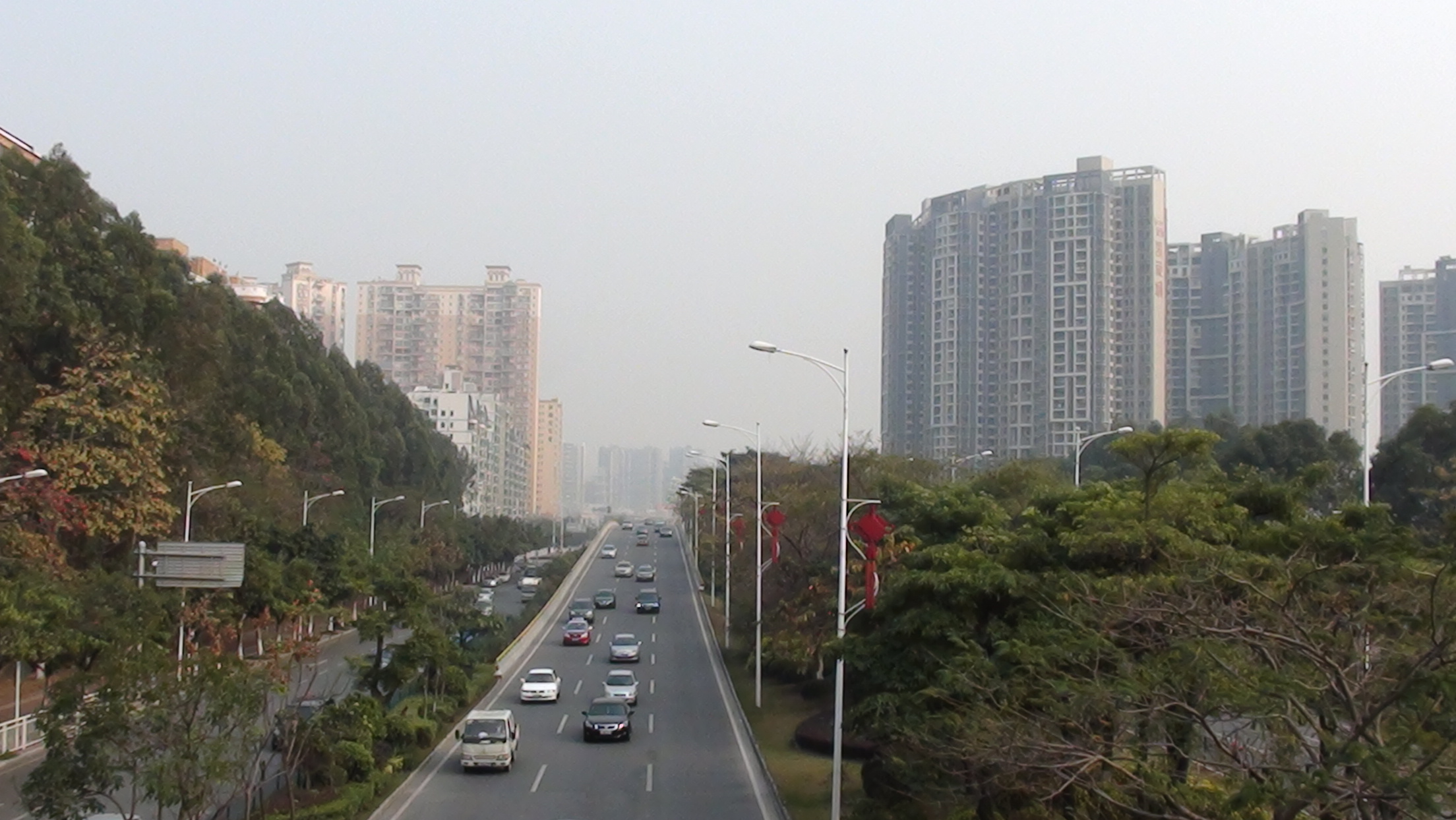 深圳市宝安大道宝安中心区路段